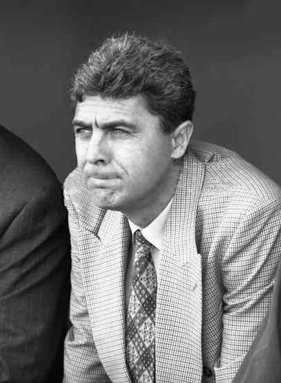 Sorin Cartu, antrenorul echipei de fotbal Rapid Bucuresti